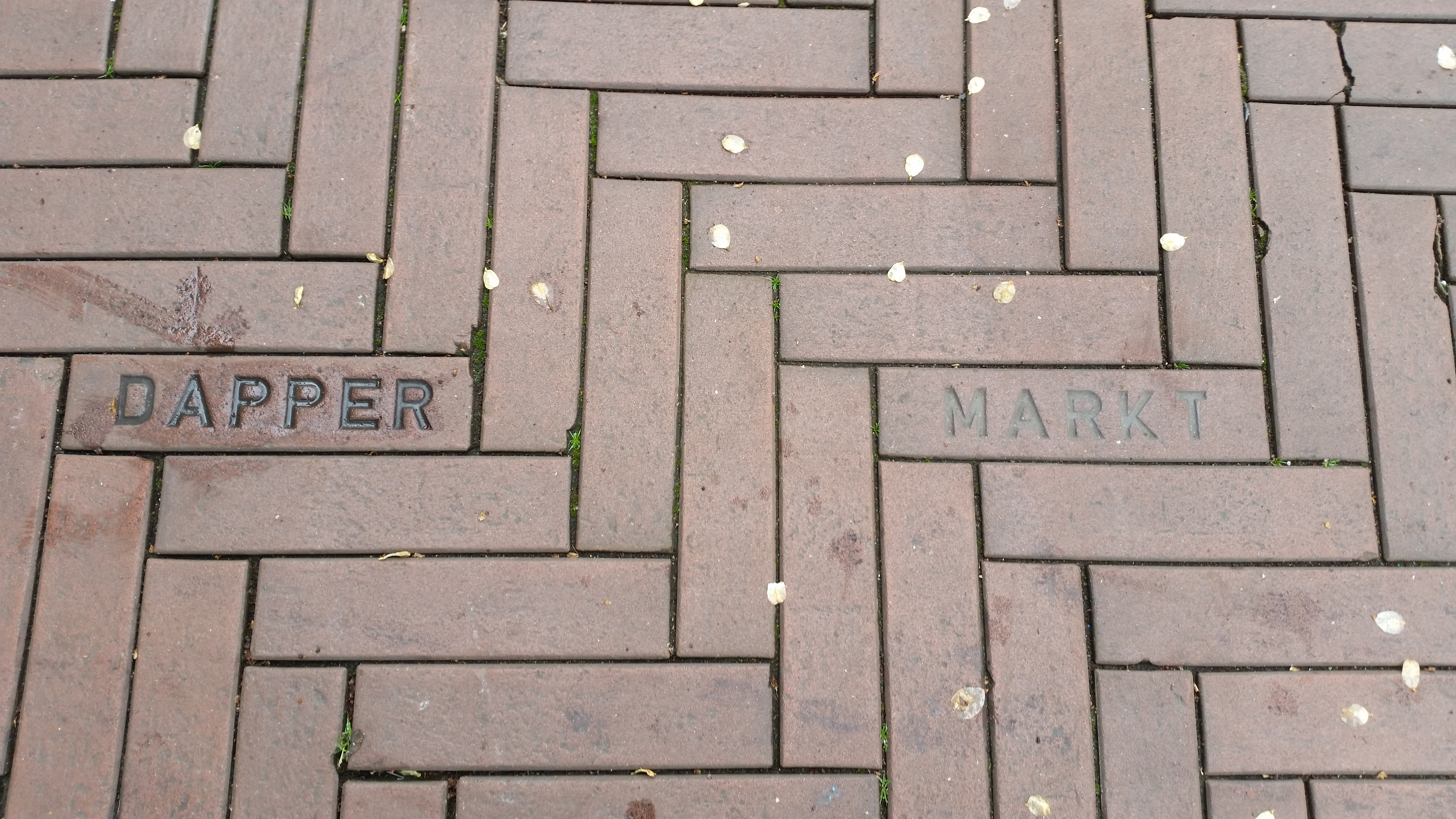 Klinkers met motief Dappermarkt in Dapperstraat, Amsterdam